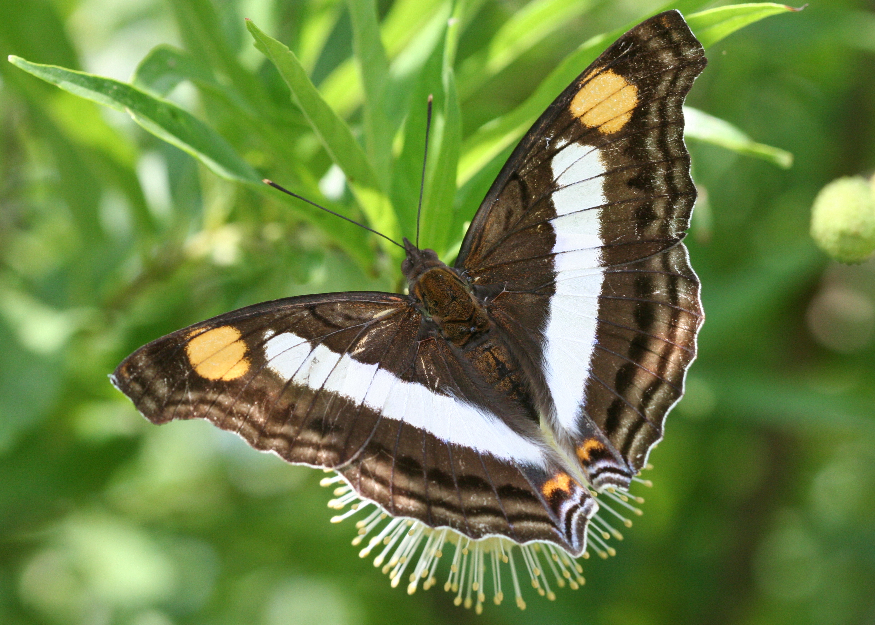 Silver emperor (Doxocopa laure) female